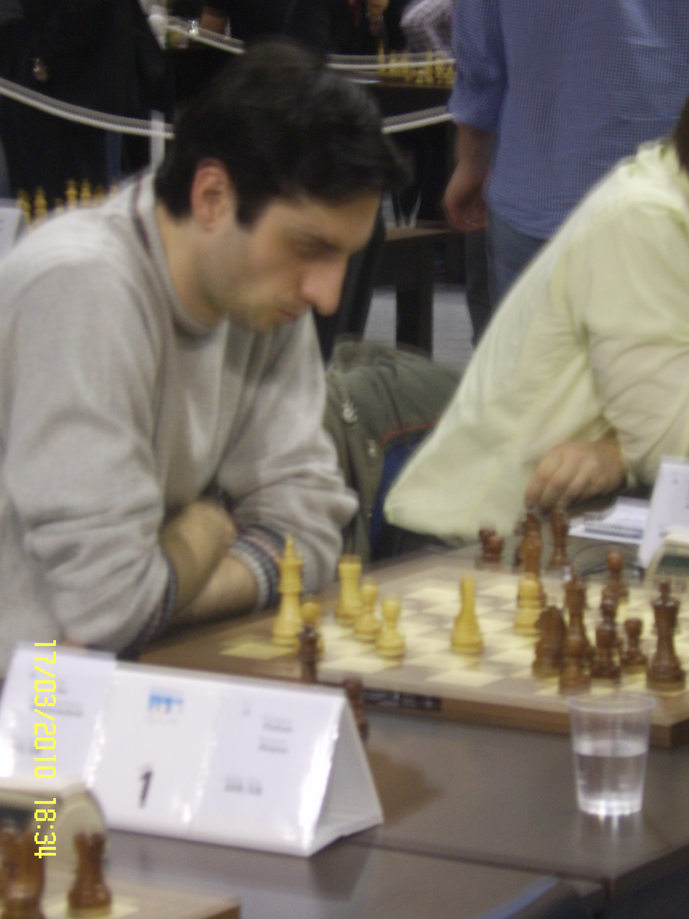 Jobava Baadur na 11. Europskom pojedinačnom prvenstvu u šahu za muškarce i žene 2010. g. u Rijeci